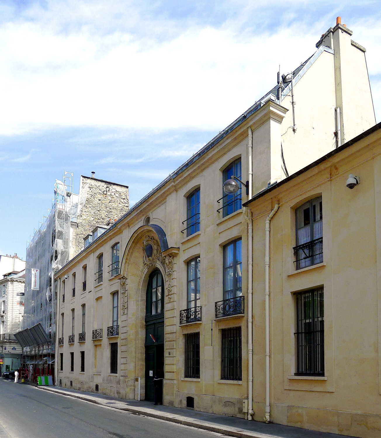 Petit hôtel de Conti, actuellement (2011), ministère de la défense